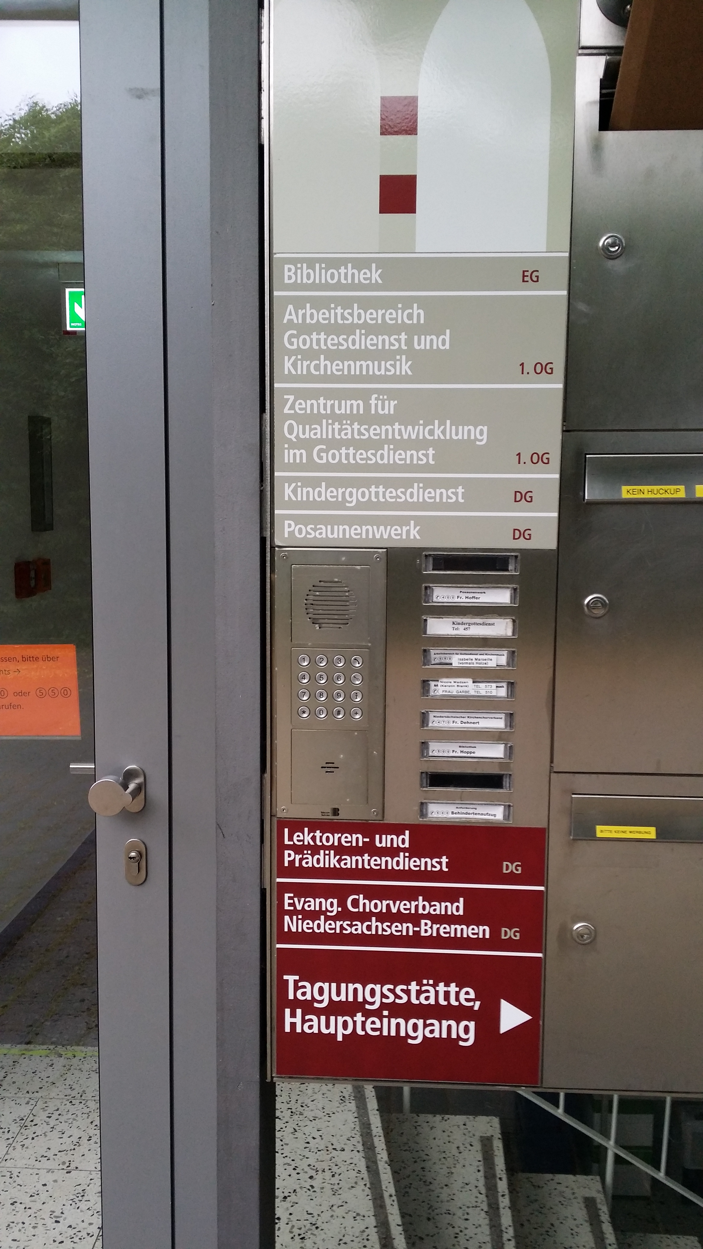 Informationsschild mit Arbeitsbereichen des Zentrum für Gottesdienst und Kirchenmusik, Hildesheim